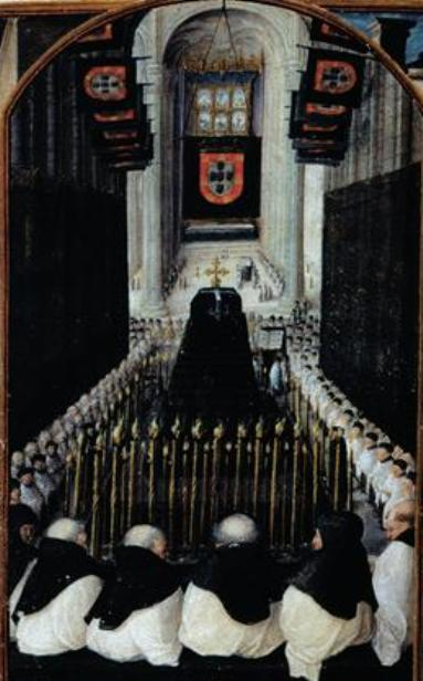 Ofício dos Mortos (enterro de D. Manuel 1517-1551 António de Holanda (Livro de Horas de D. Manuel